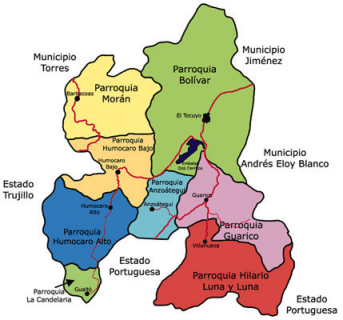 Mapa del Municipio Morán